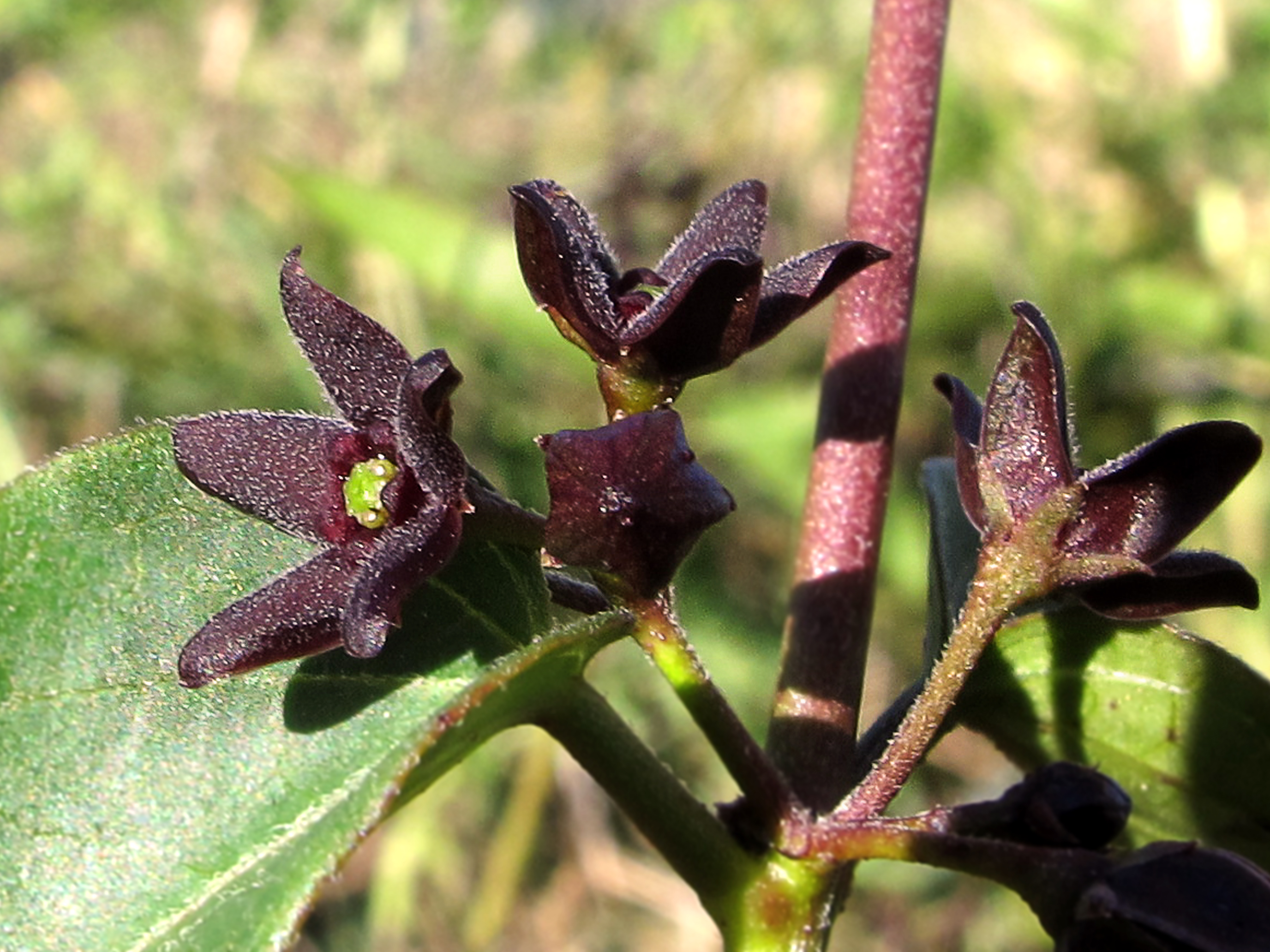 Flores